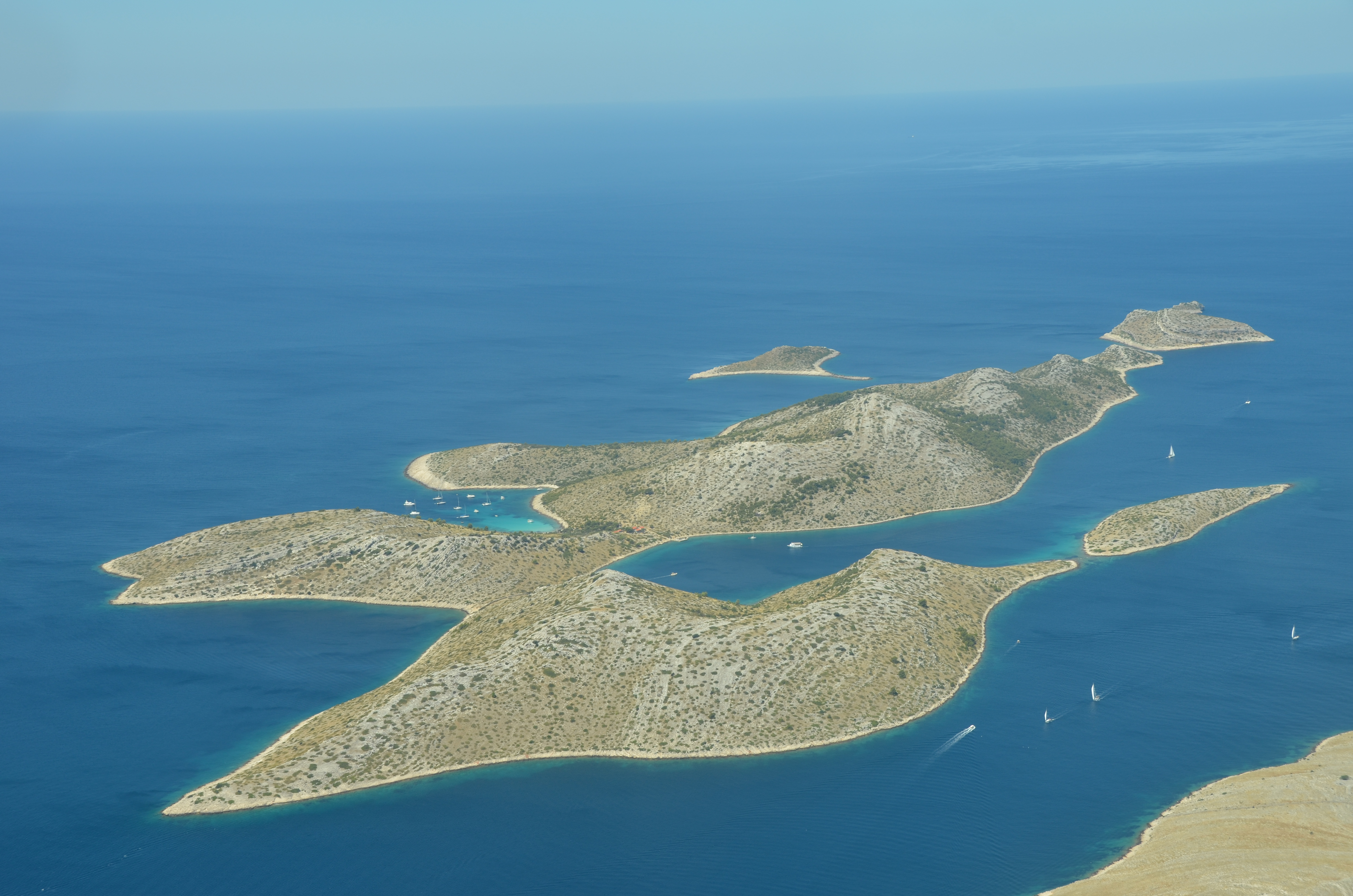 Luftbild von Otok Levrnaca